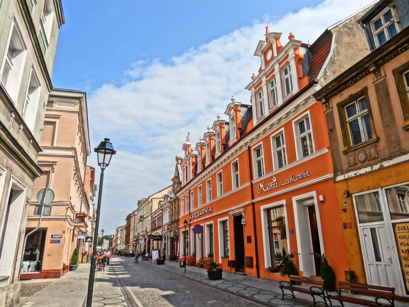 Kamienica przy ul. Długiej 22 w Bydgoszczy